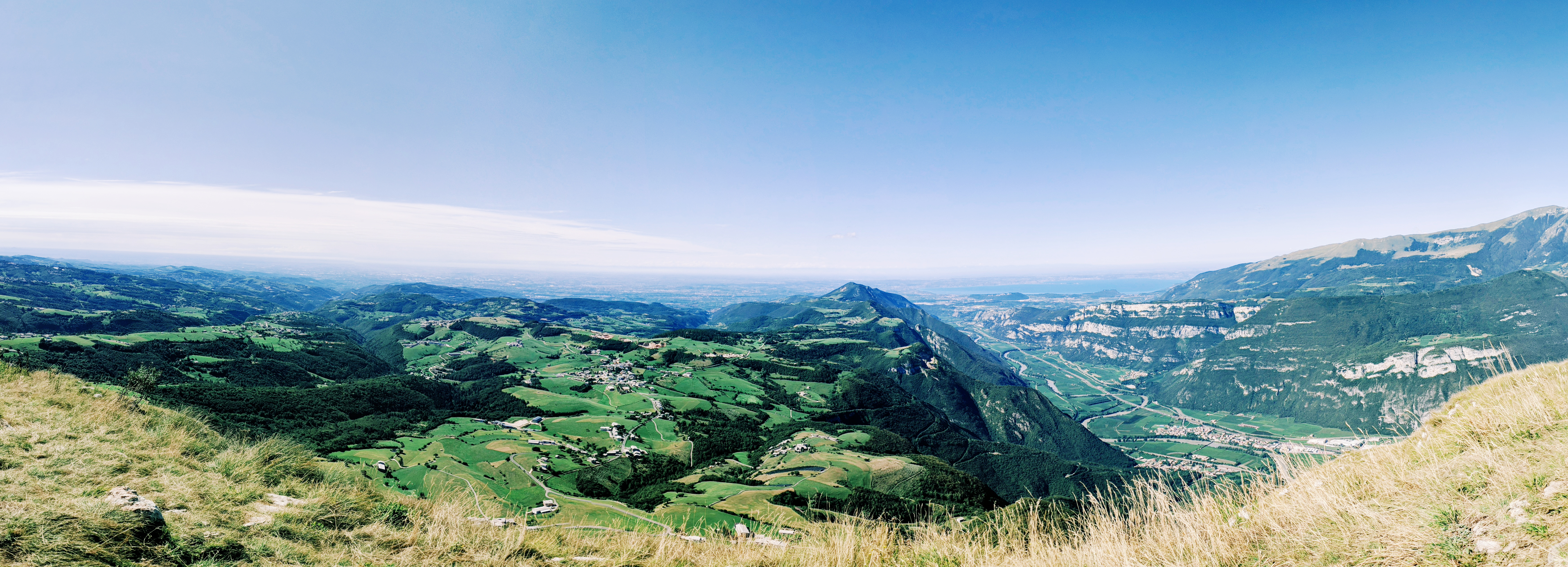 Visita dal Corno d'Aquilio in Lessinia. Sulla destra il Monte Baldo ed il Lago di garda. Centralmente il Monte Pastello e l'altopiano della Lessinia verso la Valpolicella. Sulla sinistra in lontananza Verona.